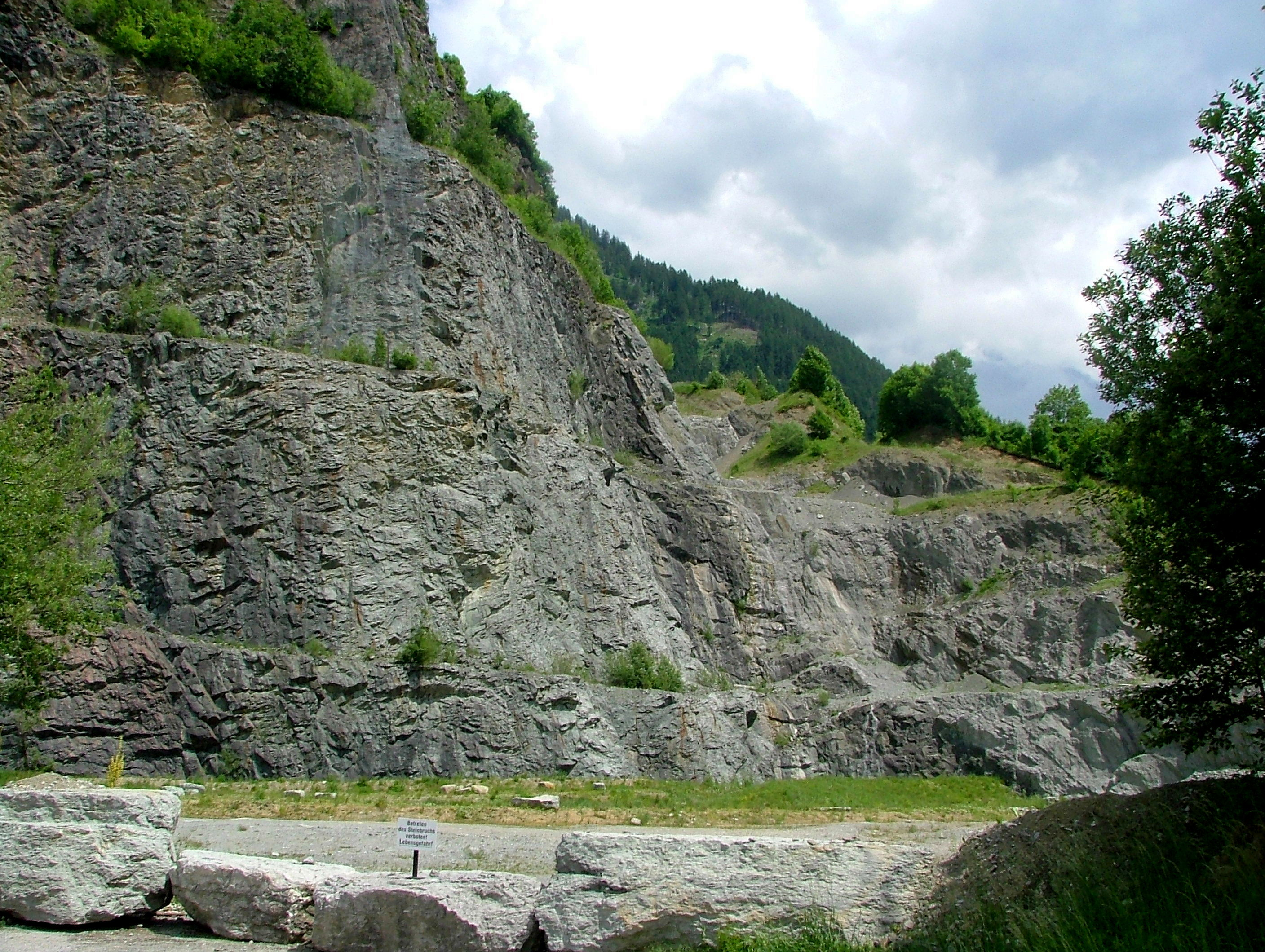 Grüntensteinbruch am sog. "Weinbergle" in der Nähe der ehemaligen "Schanz"